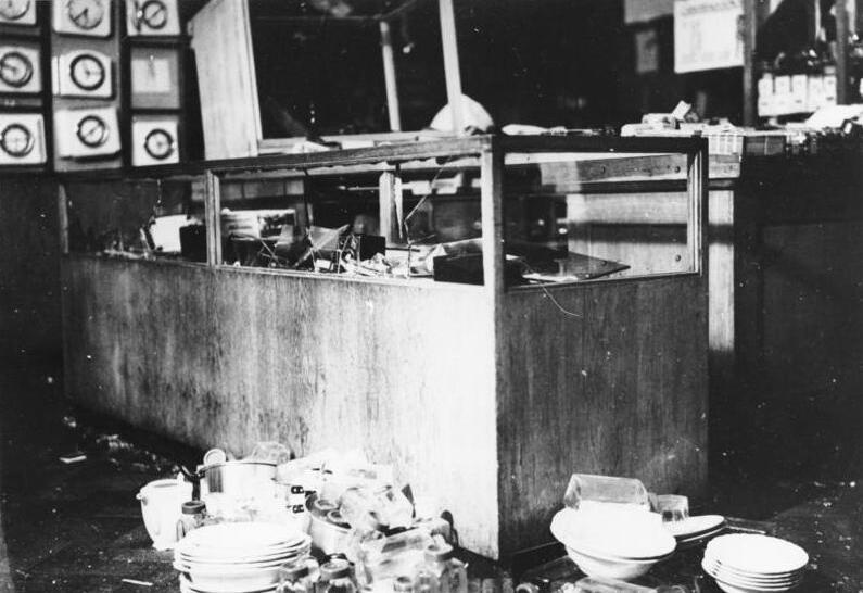 München, Kaufhaus Uhlfelder, Zerstörungen Reichskristallnacht, Zerstörungen beim Kaufhaus Uhlfelder, 9.-10.11.1938 [München.- Reichspogromnacht / "Reichskristallnacht".- Zerstörungen im Kaufhaus Heinrich Uhlfehlder GmbH]